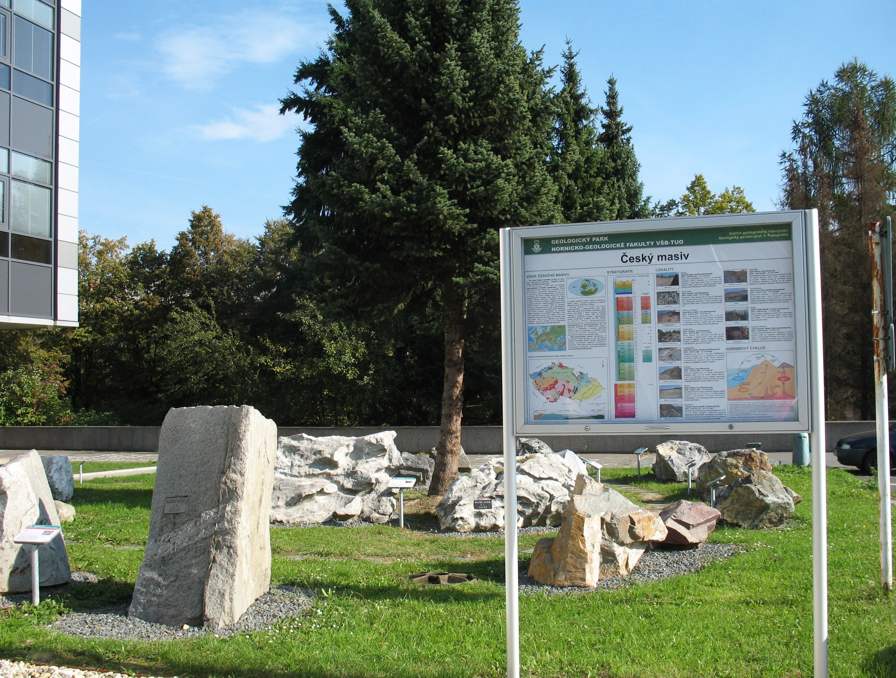 Geopark - ukázky hornin z různých regionů, umístěné před Geologickým pavilonem prof. F. Pošepného v Ostravě-Porubě